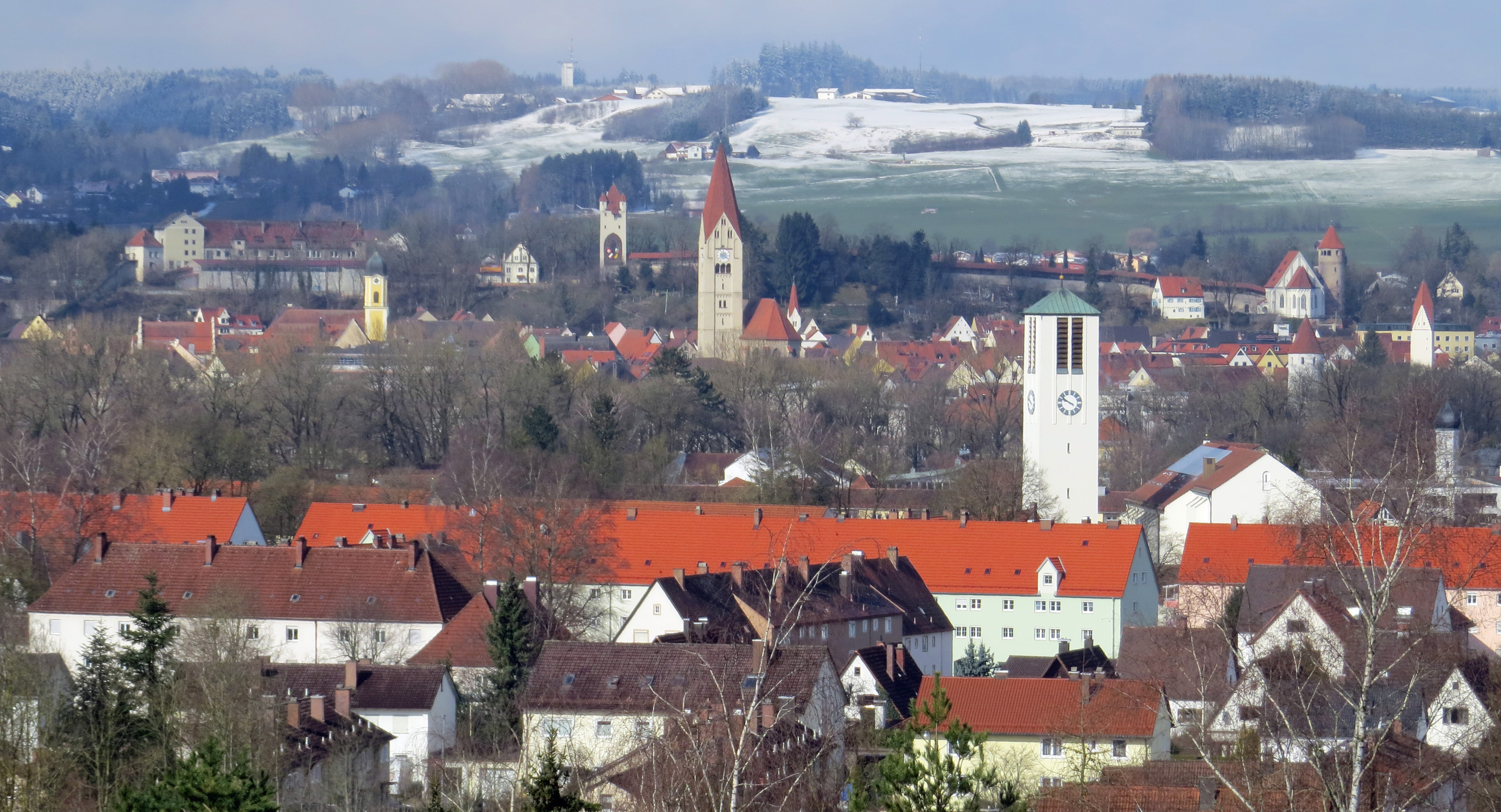 Kaufbeuren von Osten